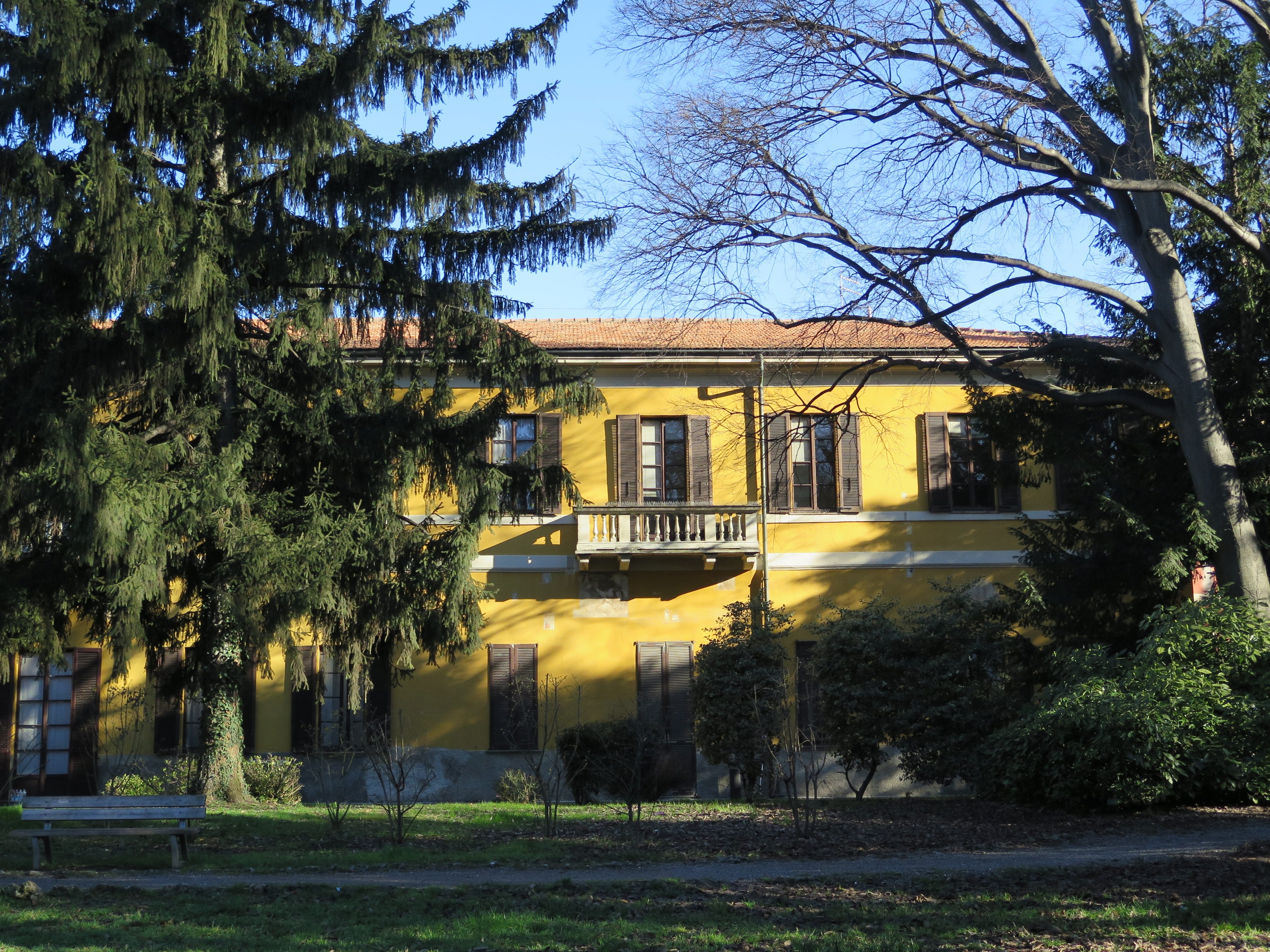 Villa Fiorita - sede del Municipio di Brugherio - vista dal Parco